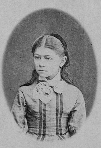 скан фотографии М.П.Чеховой